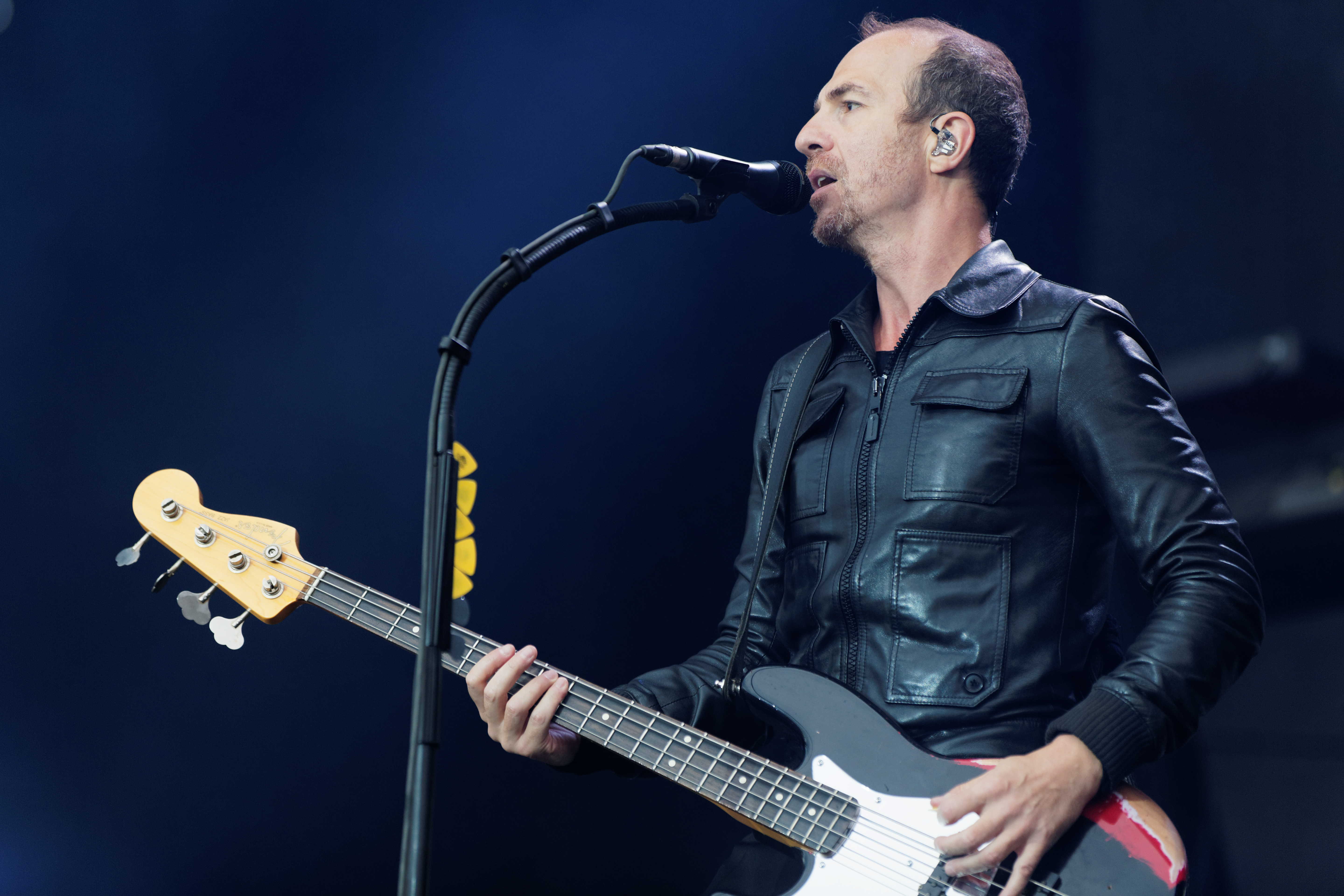 Le festival des vieilles charrues 2015.